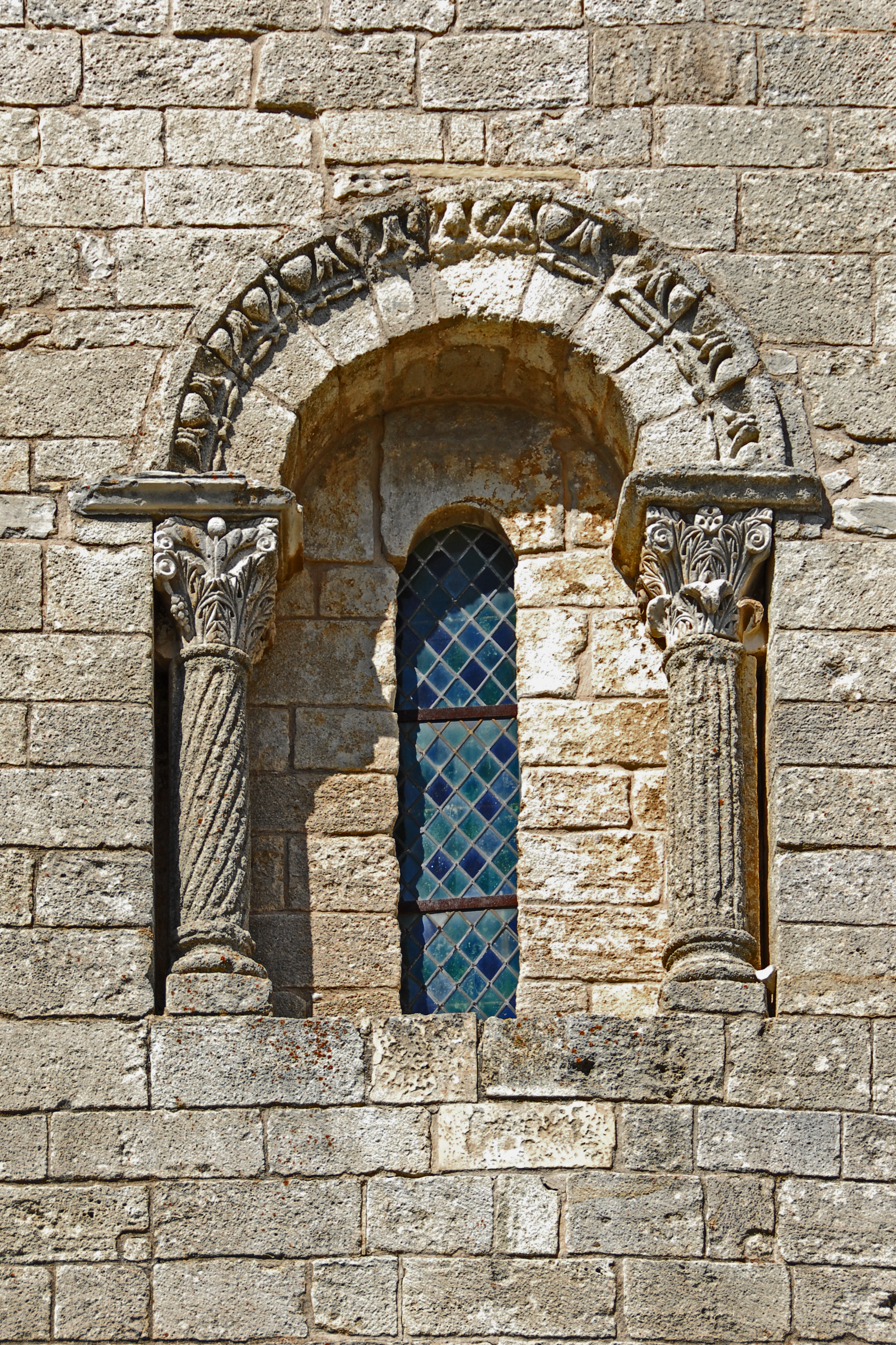 St-Trinit, Chorjoch, Fenster Südfront